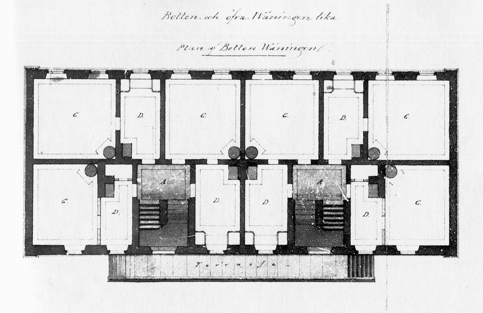 Gröna gården planritning, bottenvåning